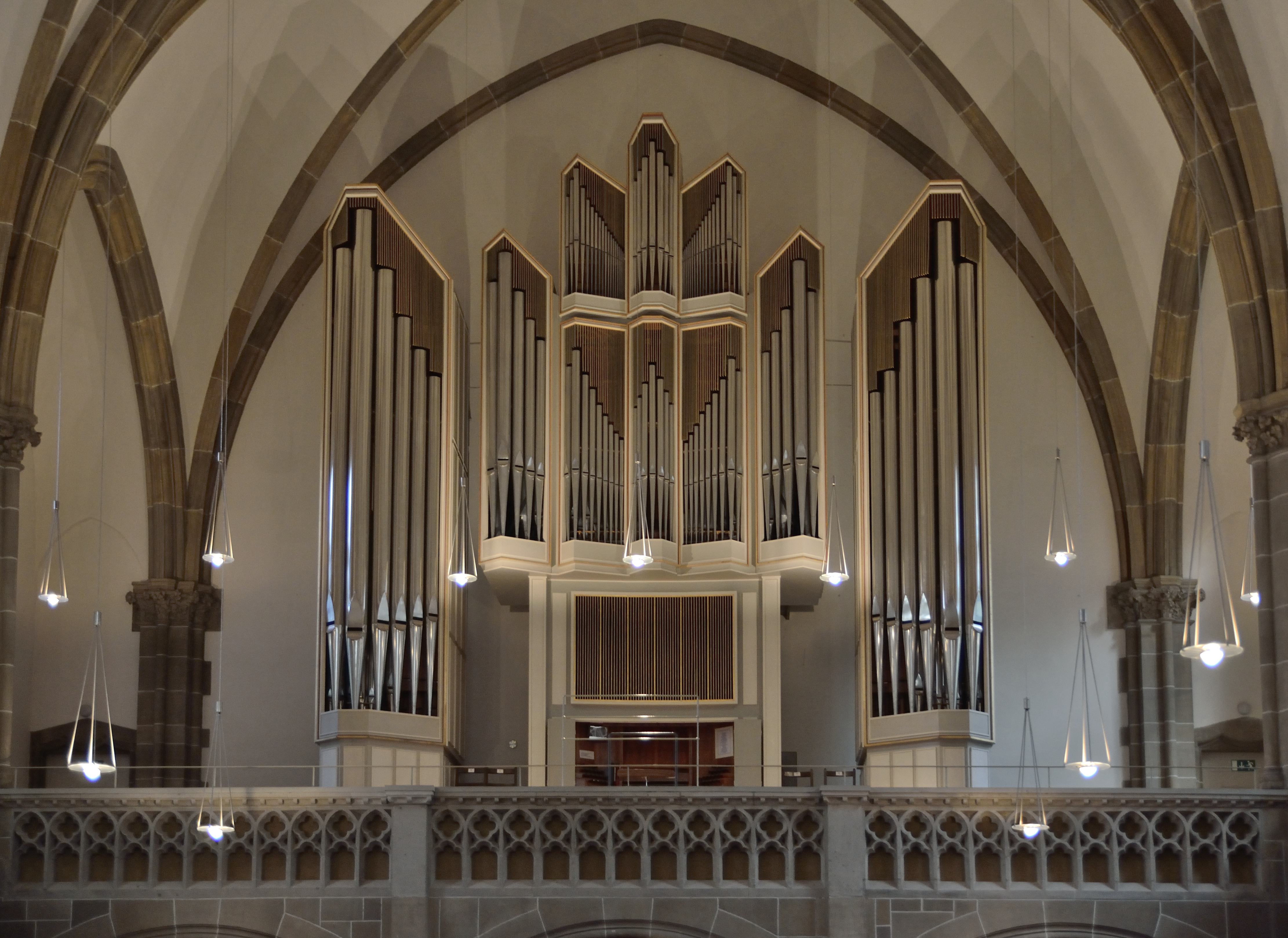 This is a photograph of an architectural monument. Christuskirche Detmold, Orgel